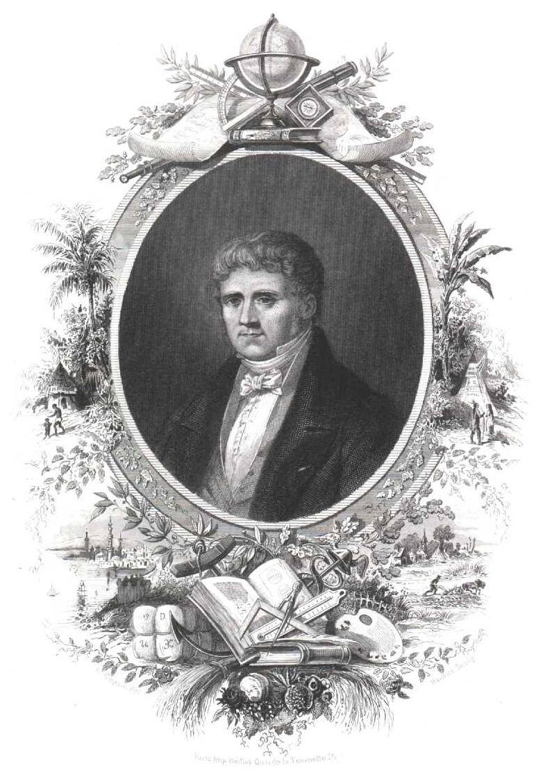 *sujet: Conrad Malte-Brun licence